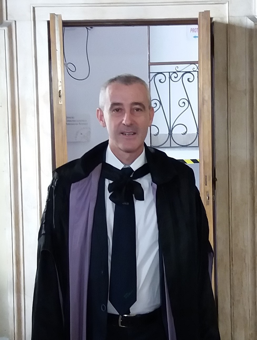 Stefano Maggi